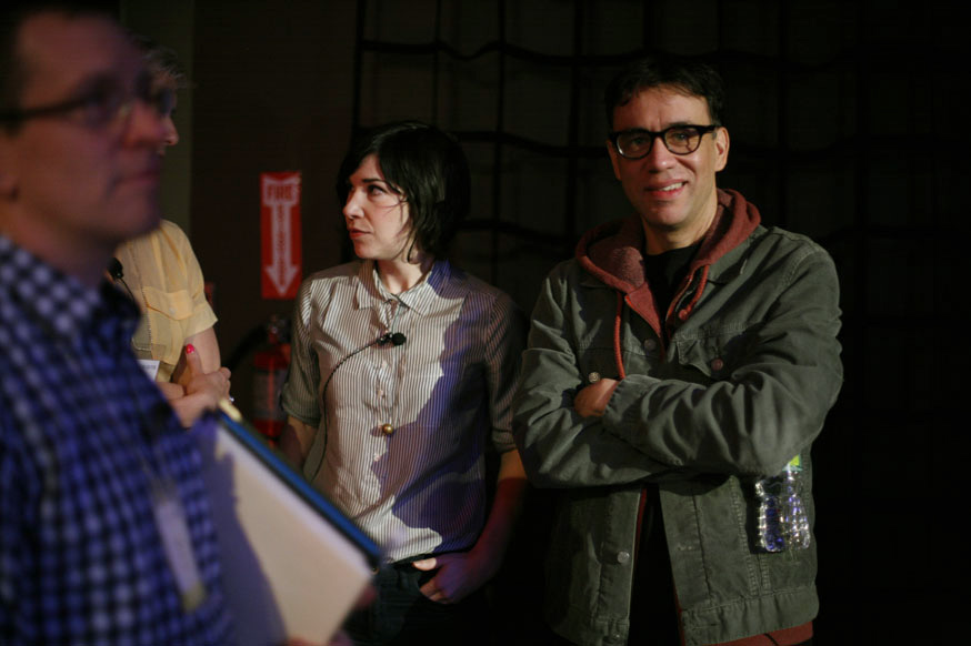 Photo By Kent Derek